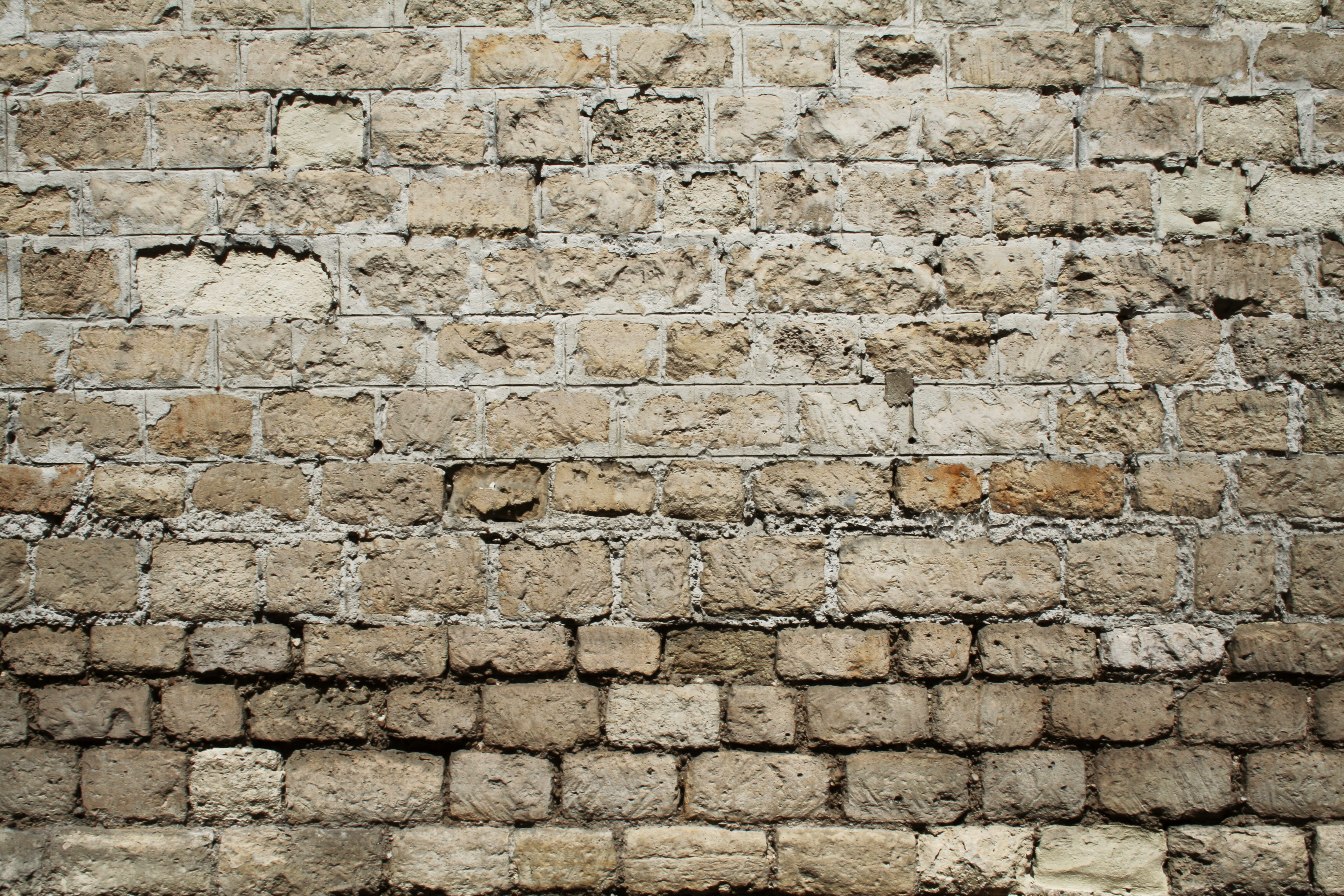 Maçonnerie (mur mitoyen) en moellons de calcaire smillés partiellement jointoyés au mortier de chaux (joints tirés au fer).